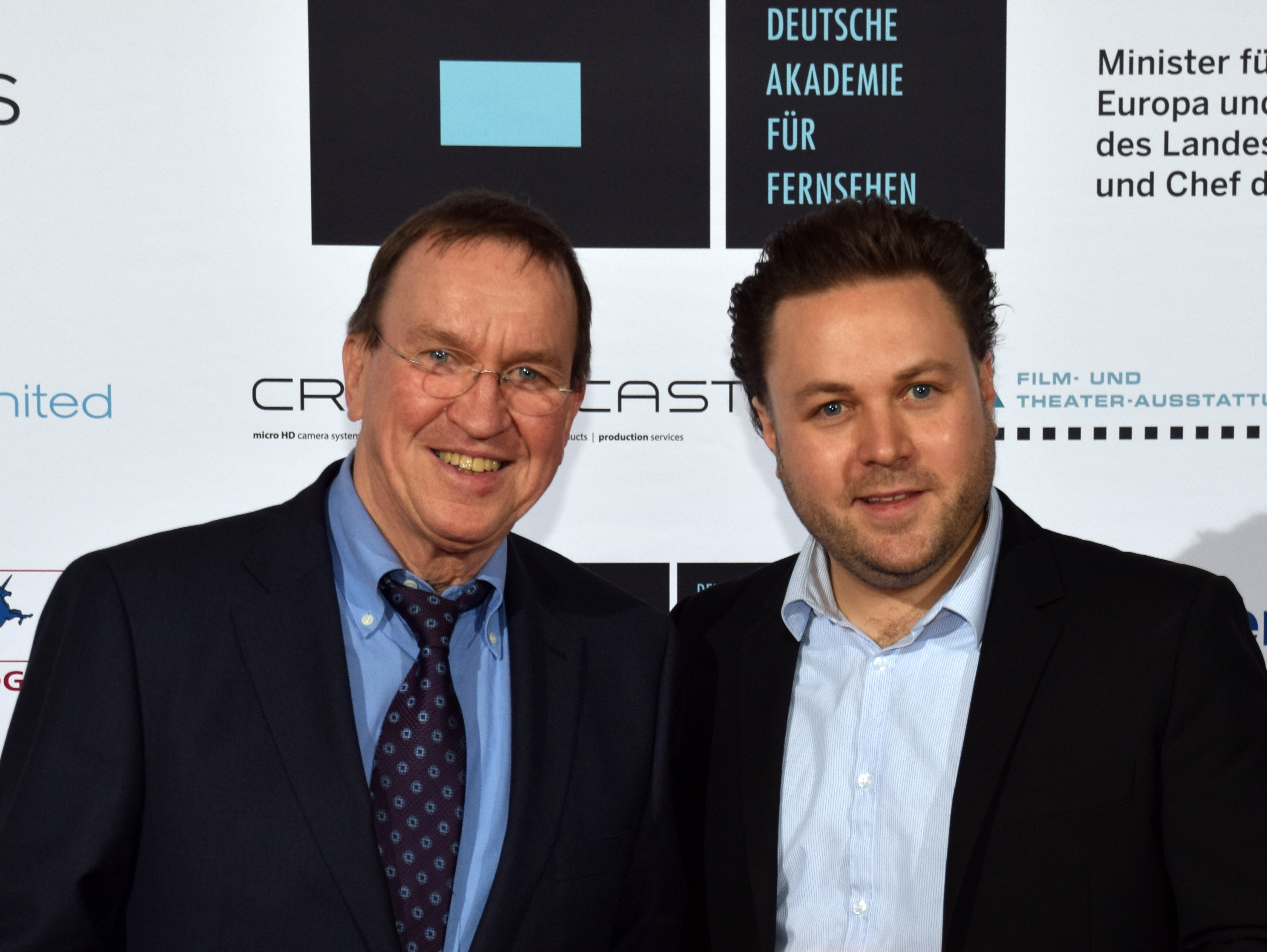 Ulrich Chaussy (Journalist), Daniel Harrich (Regisseur, Dokumentarfilmer) Deutsche Akademie für Fernsehen - Symposium und Preisverleihung 2015 in Köln